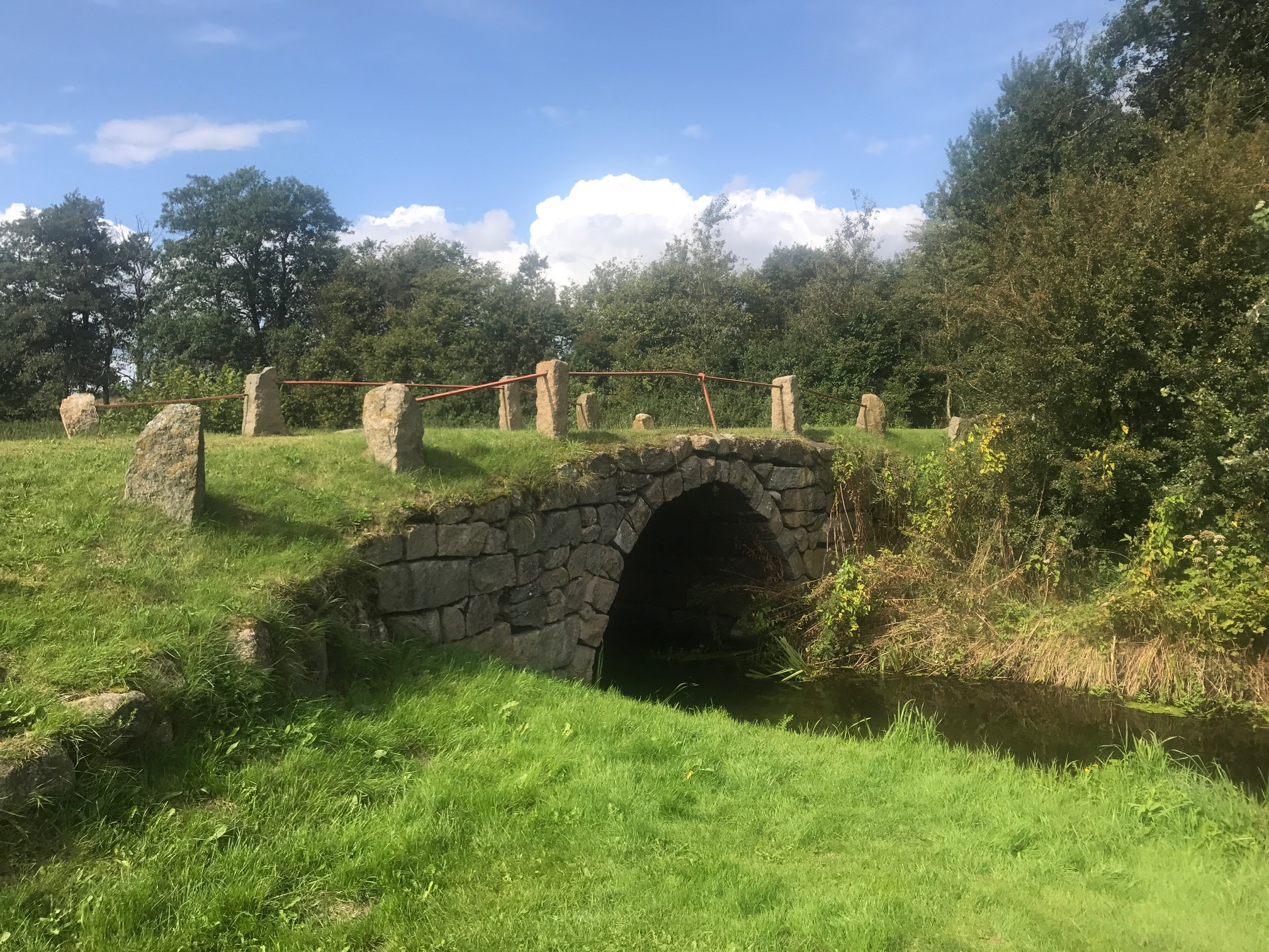 Puente "Povls Bro" cerca de Kliplev